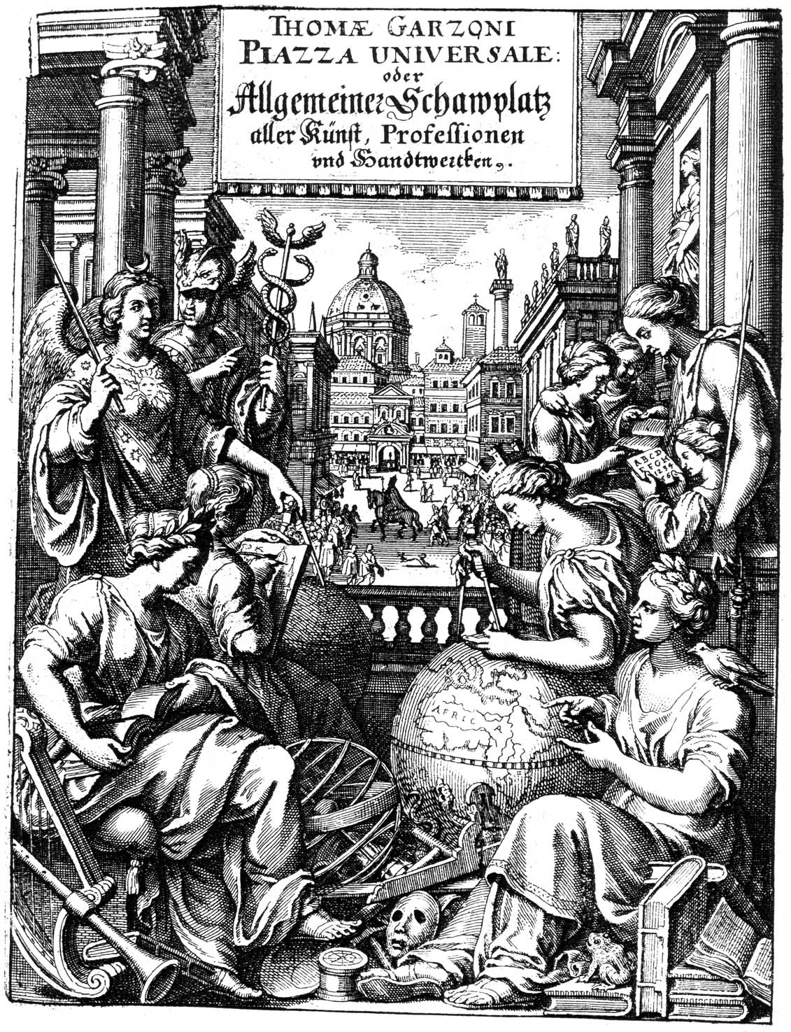 Frontispice de l'édition allemande de 1659 de La piazza universale di tutte le professioni del mondo de Tommaso Garzoni